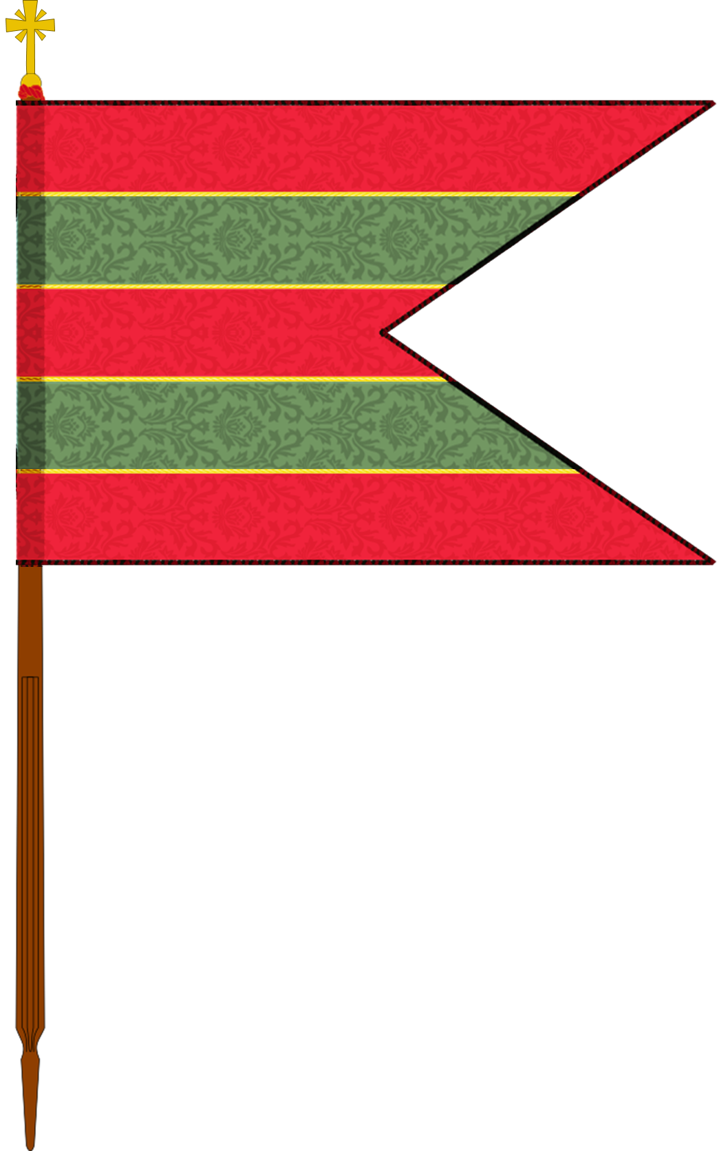 Pendón de Genicera